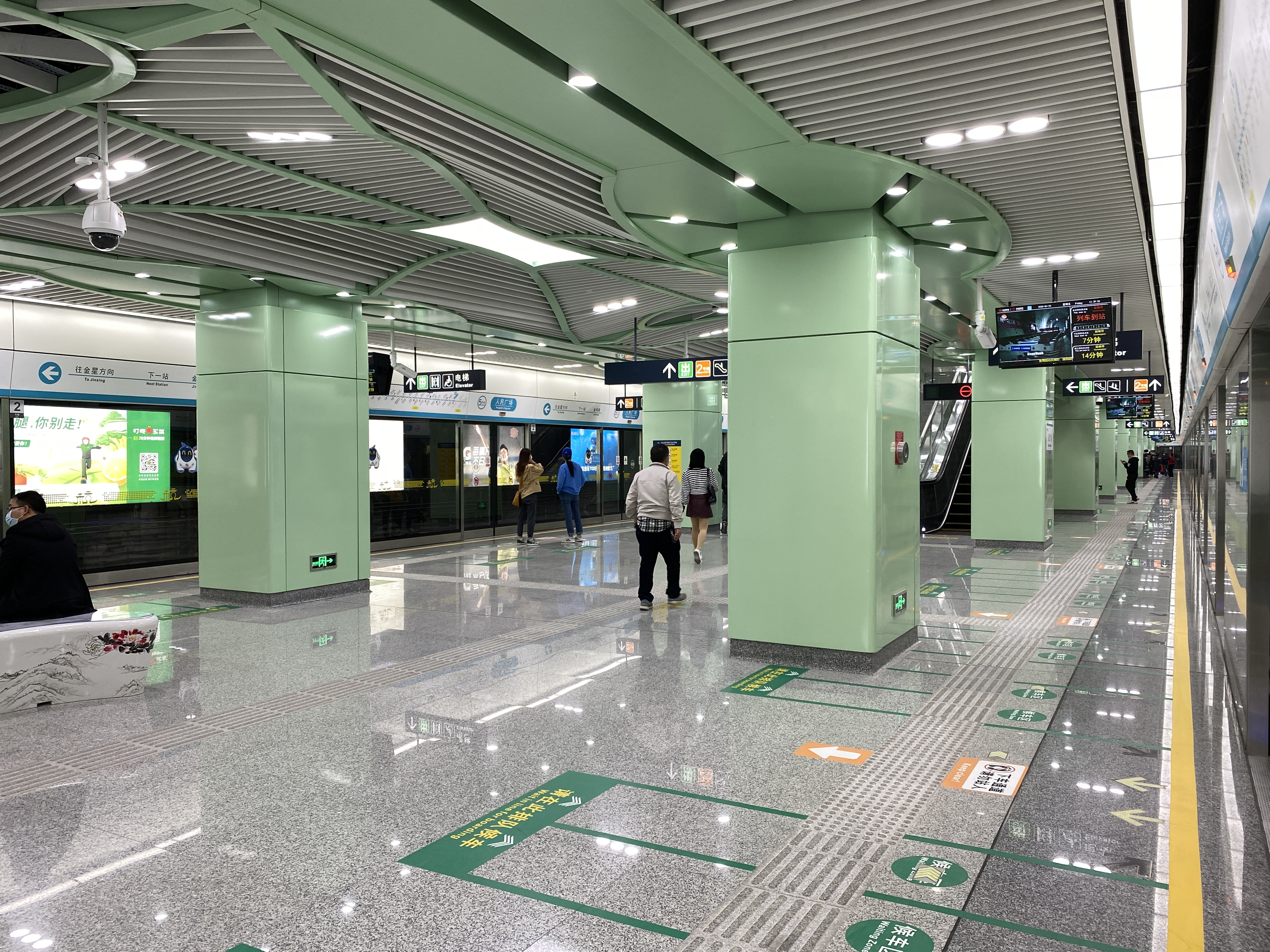 人民广场站5号线站台